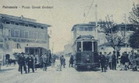 Capolinea tranviario di Pietrasanta